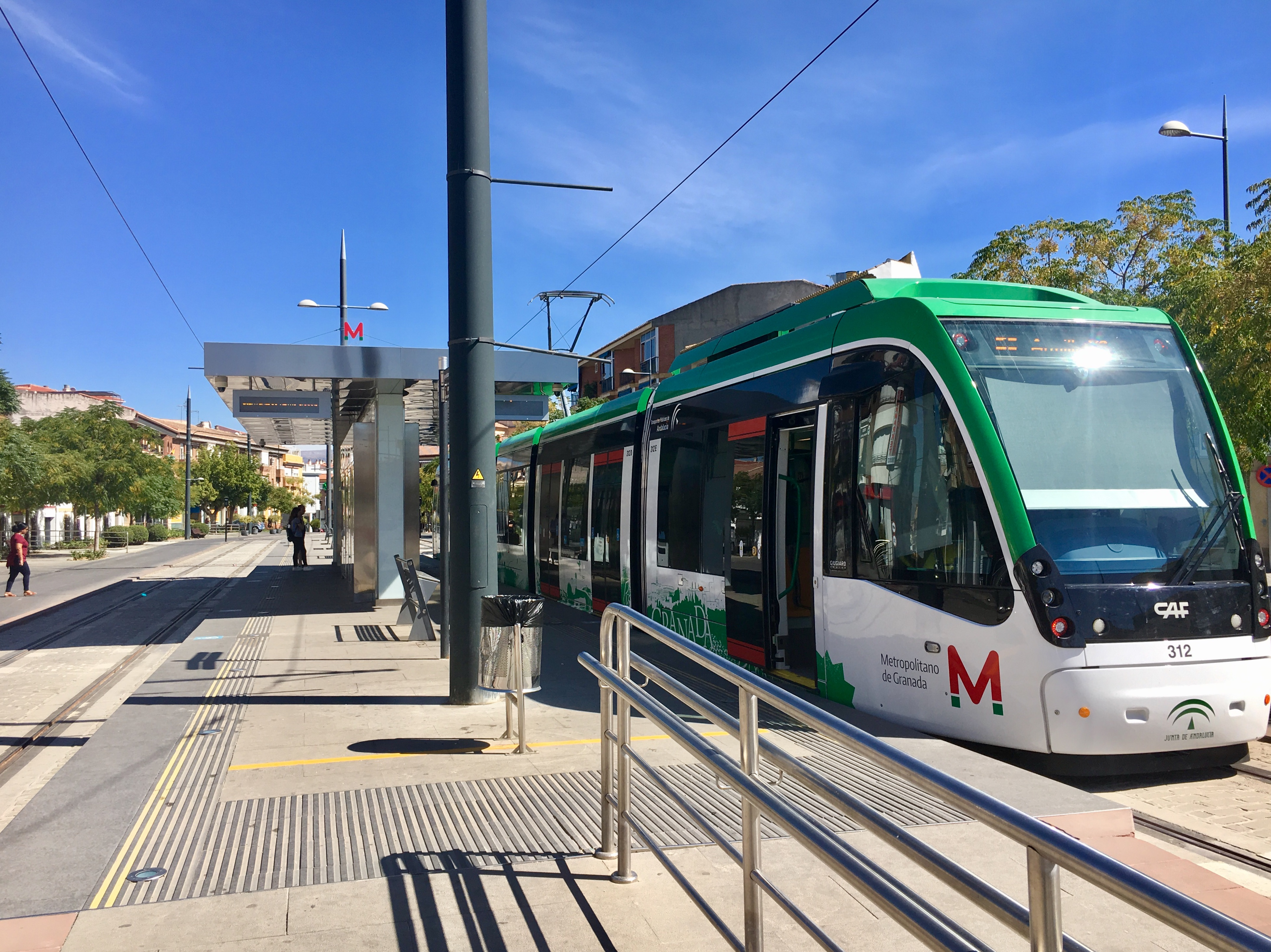 Unidad del Metro de Granada en la estación de Armilla.